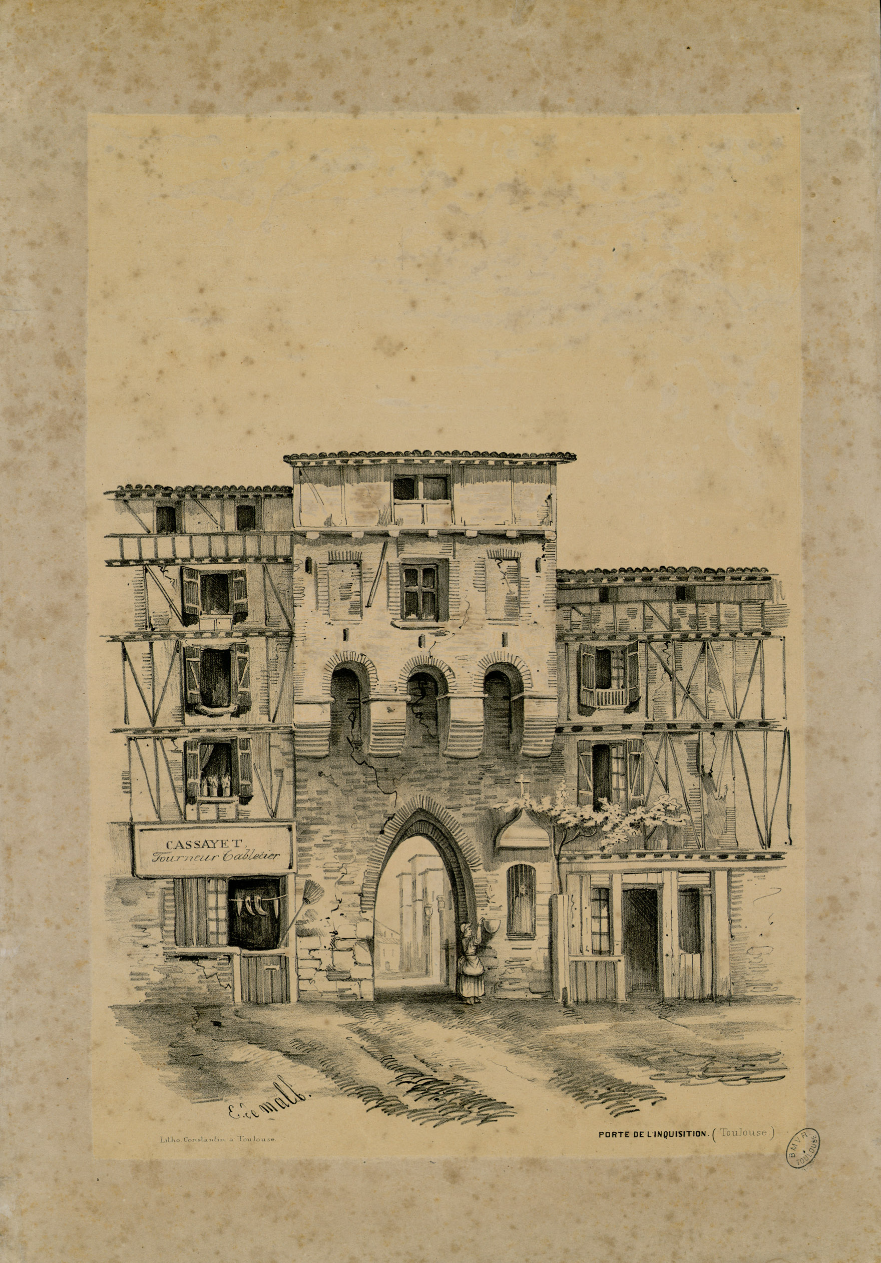 Fait partie d'un recueil de 23 planches lithographiées en camaïeu Ancely, René (1876 - 1966). Possesseur